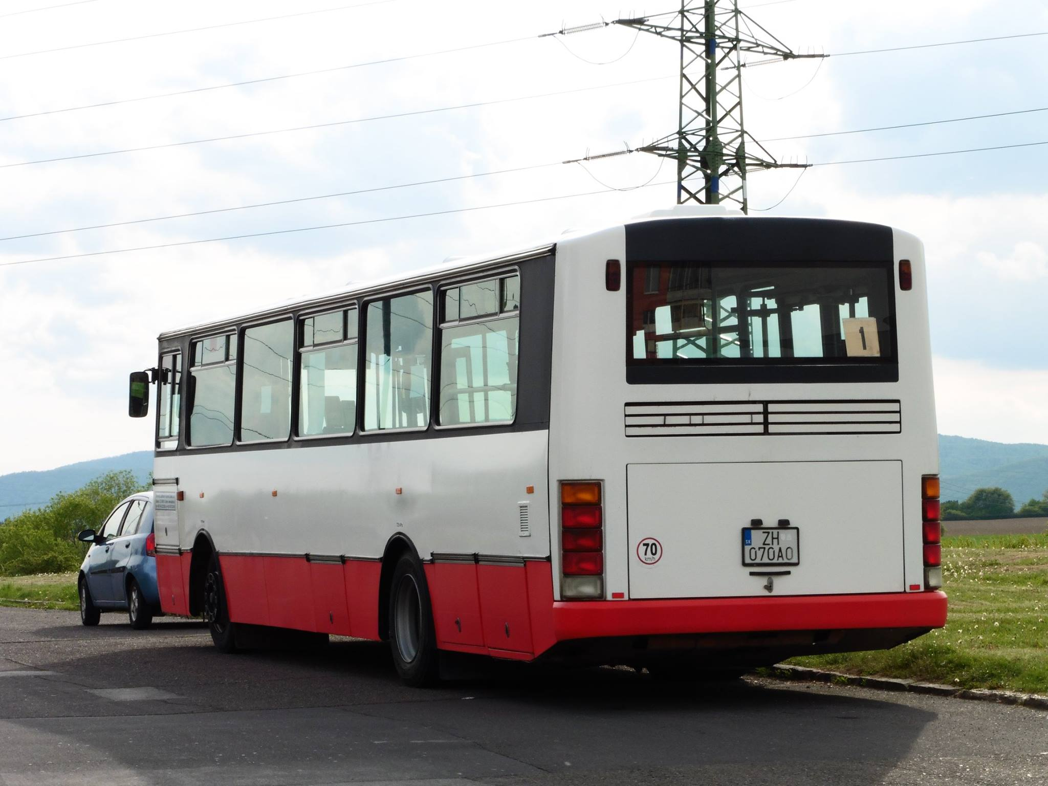 Created by Jozef Brzula